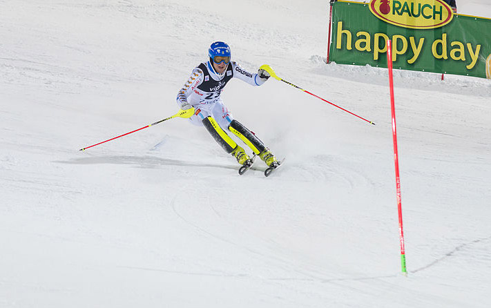 Anton Lahdenperä, alpine skier from Sweden, at Zagreb race (06-01-2015)